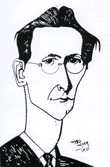 Roel Houwink, getekend in 1925 door Wybo Meyer.